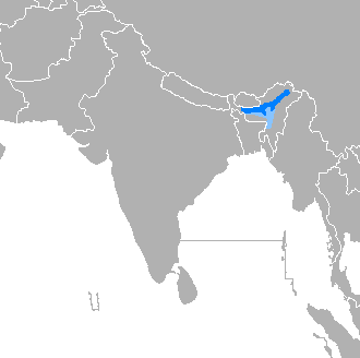 Donde es mayoritario Donde es minoritario